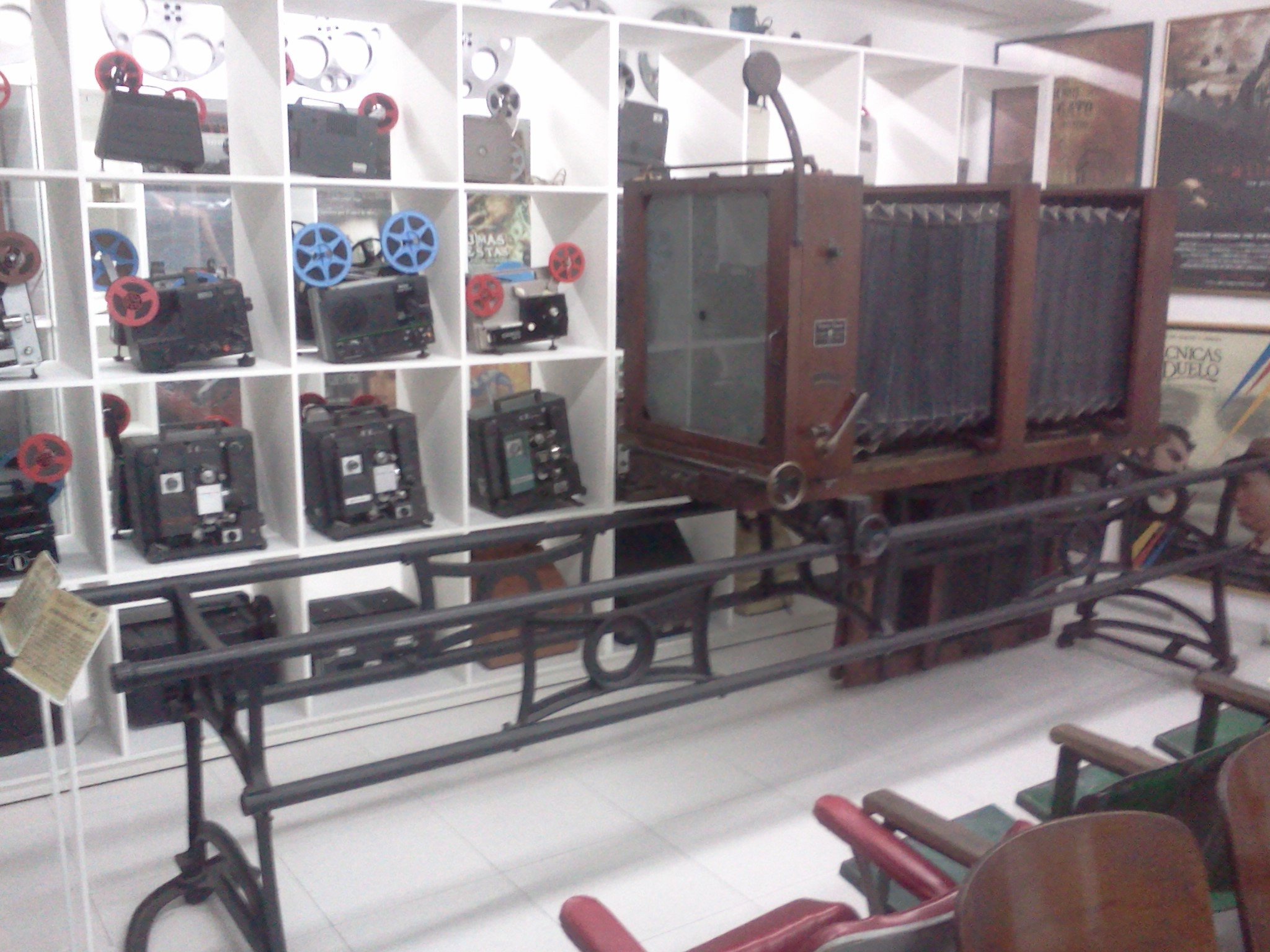 La cámara fotográfica más grande del mundo, ubicada en el museo Caliwood